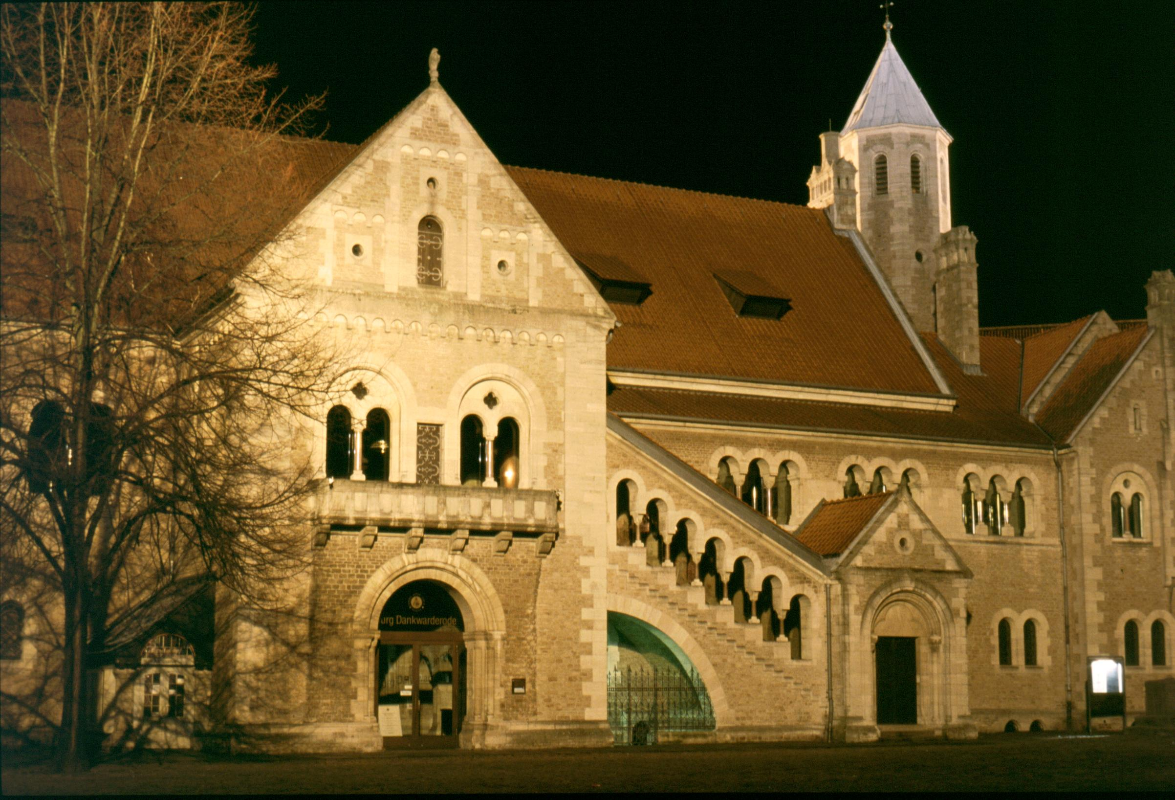 Burgplatz in Braunschweig, Germany January 2003 by Matthias Prinke